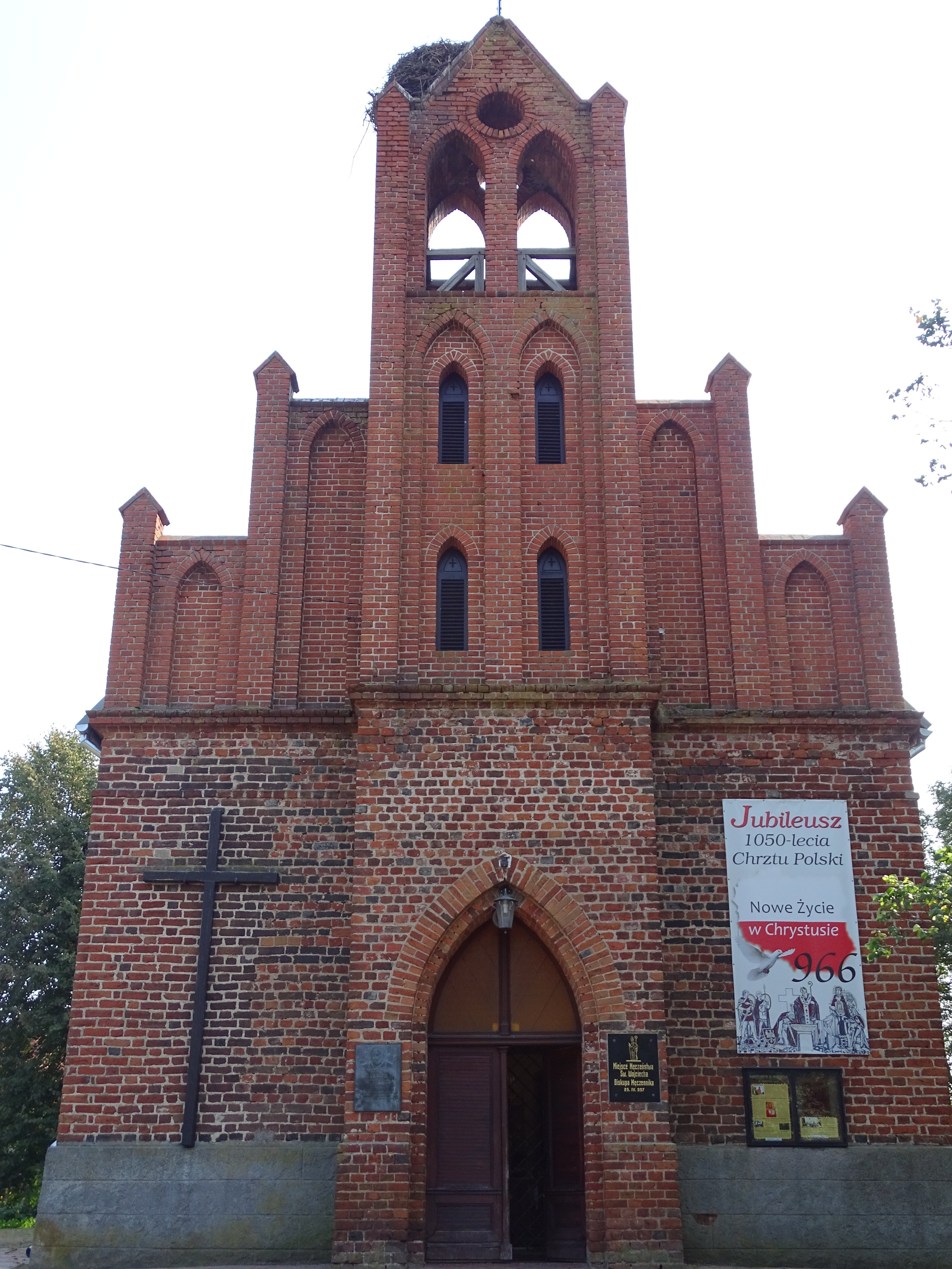 Święty Gaj - rzymskokatolicki kościół filialny pw. św. Antoniego wraz z cmentarzem, XV, 1878 (miejsce śmierci męczeńskiej św. Wojciecha)